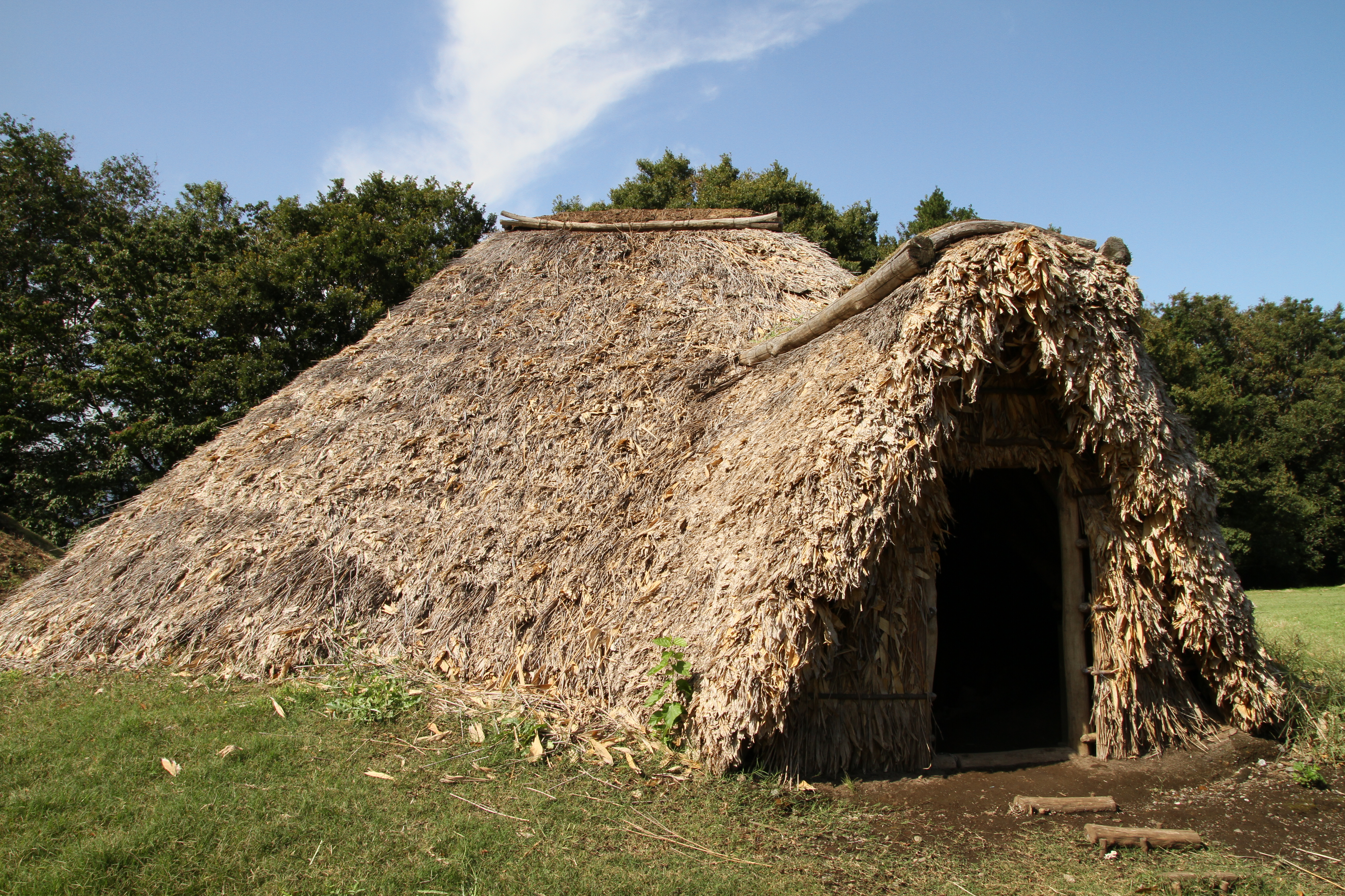 笹葺屋根として復元された勝坂遺跡1号住居